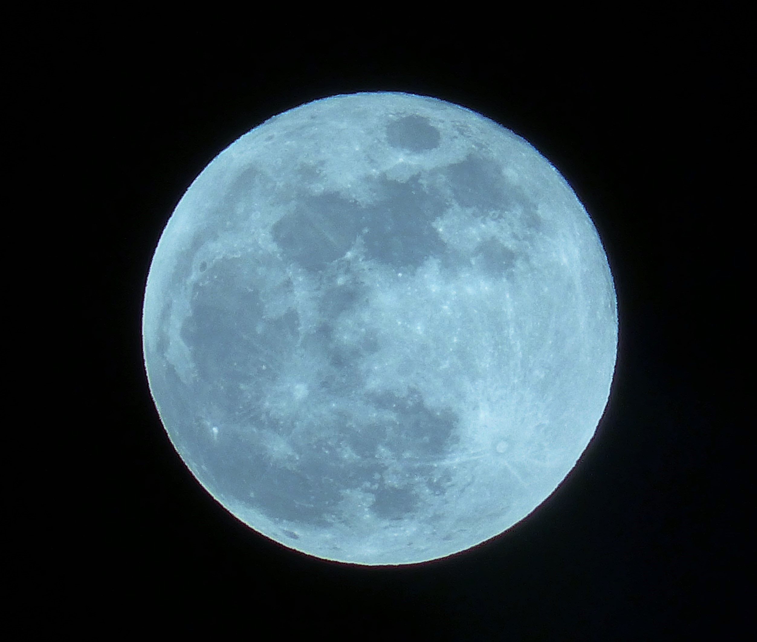 West Byfleet, Surrey